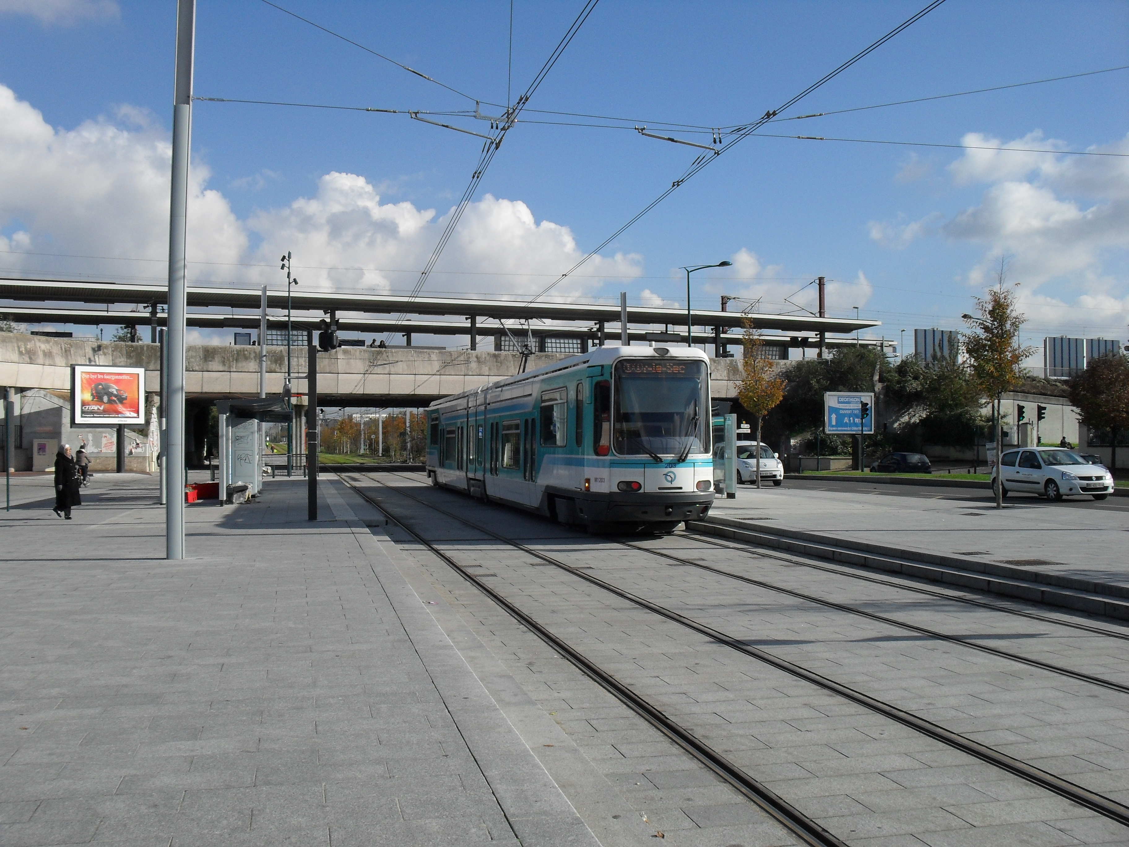 Paris Tramway ligne 1